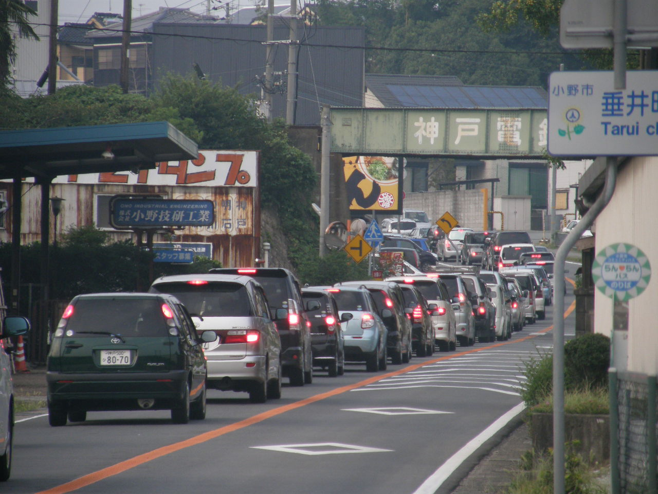 夏祭りへ向かう自動車で渋滞する道路